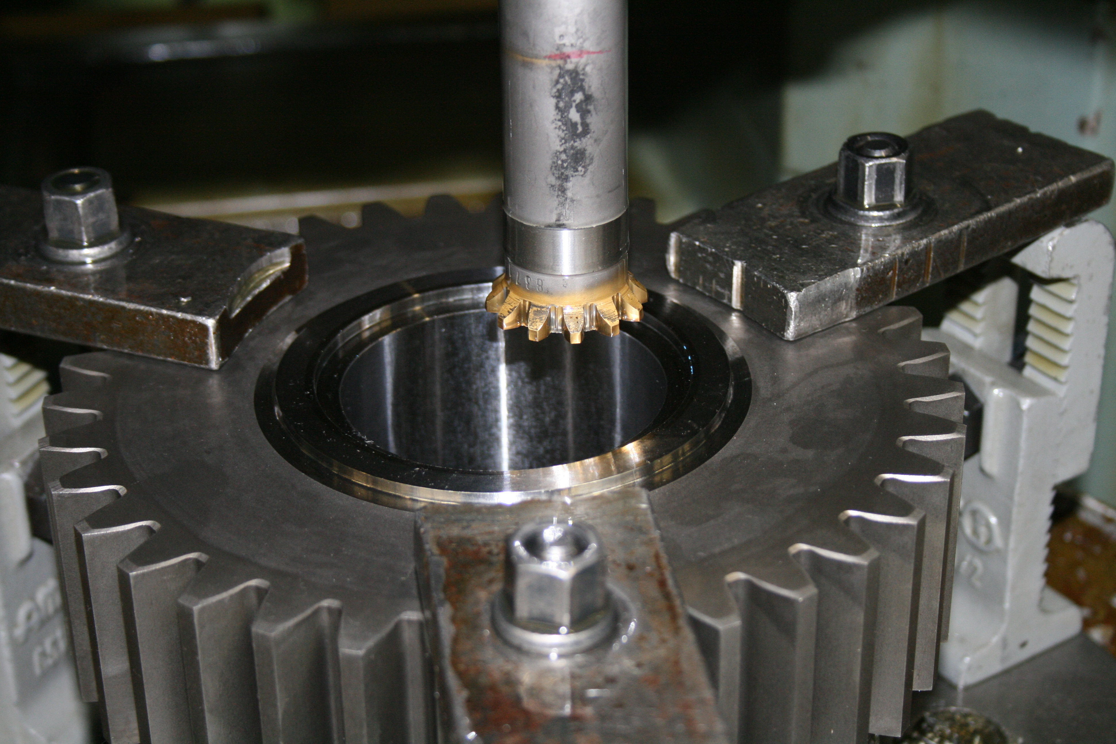 Werkstueck auf Waelzstossmaschine